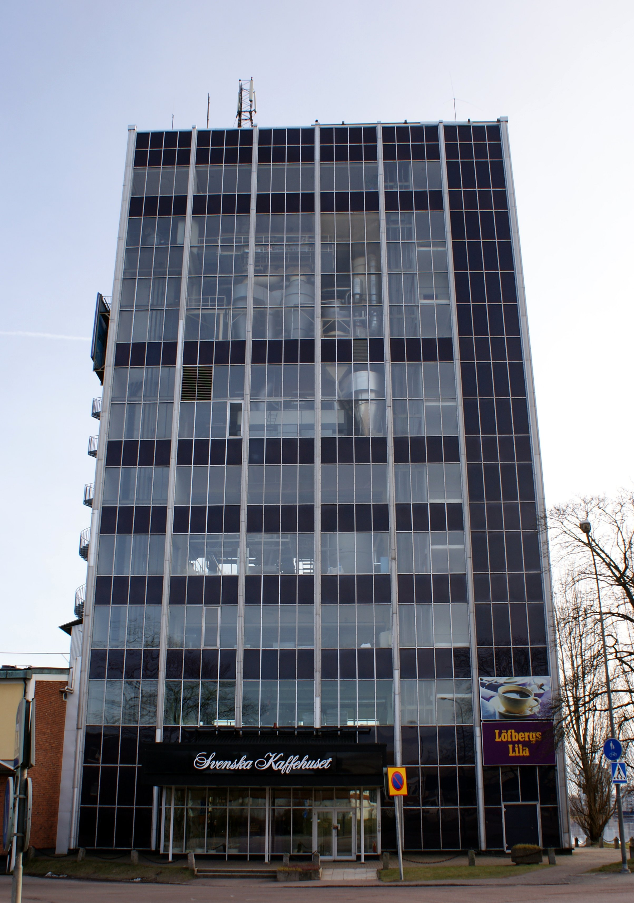 Löfbergs Lila, kafferosteri i Karlstad. Arkitekt Stig Florén på John Wästlunds Arkitektbyrå. Byggnadsår 1960